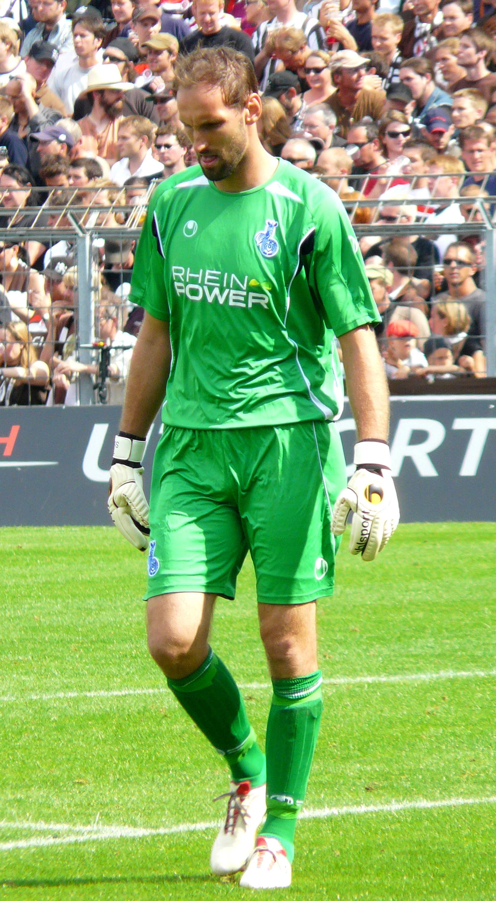 Tom Starke(MSV Duisburg)